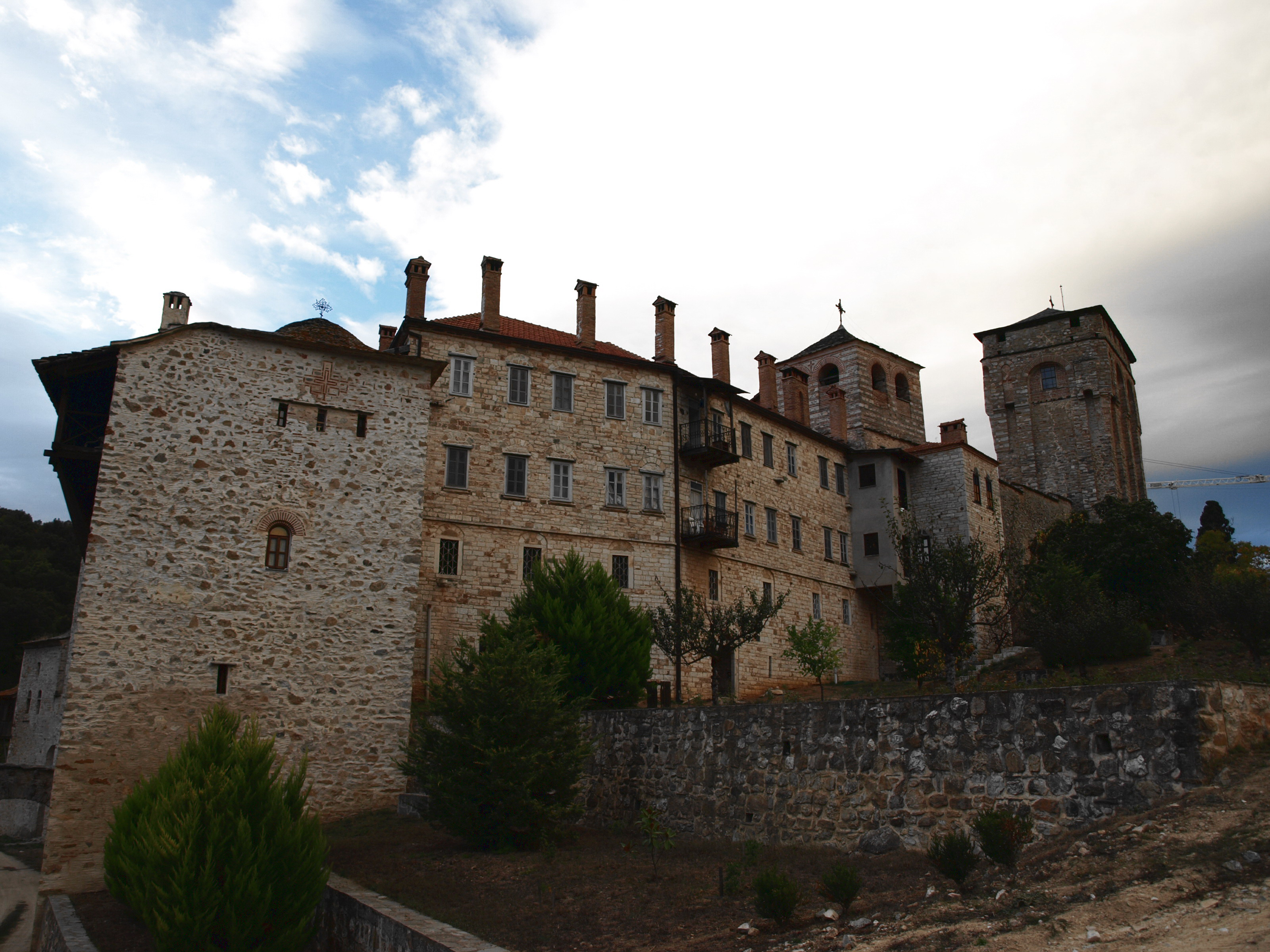 Хиландар - Пајсијева келија и Болница